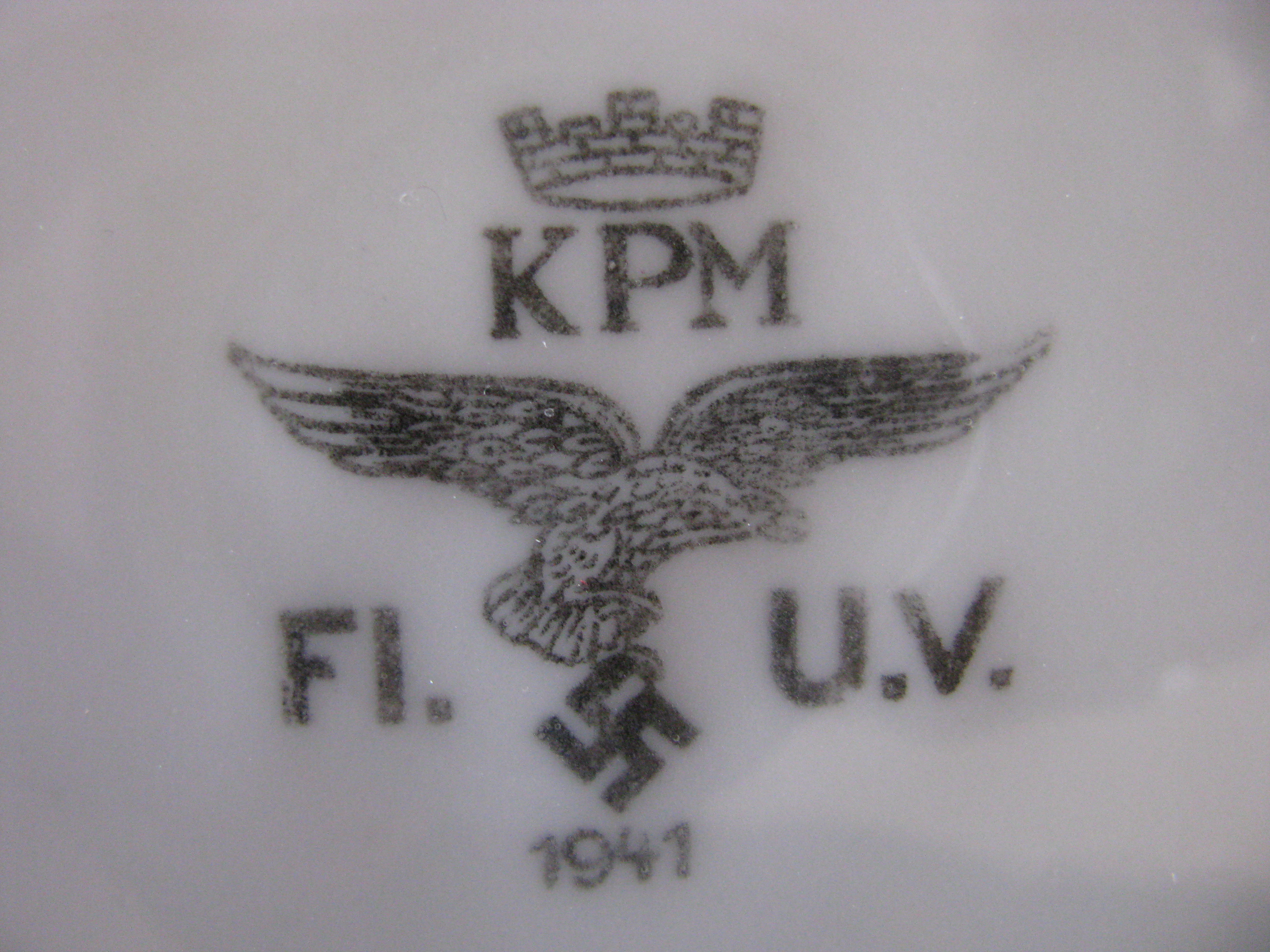 Fleischplatte oder Servierplatte - Manufaktur: Krister Porzellan-Manufaktur, Stempel mit Jahreszahl 1941, Adler und Hakenkreuz, Buchstaben: Fl. U. V.